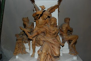 Aradi Szabadság-szobor terve (Ereklye-múzeum, Arad)